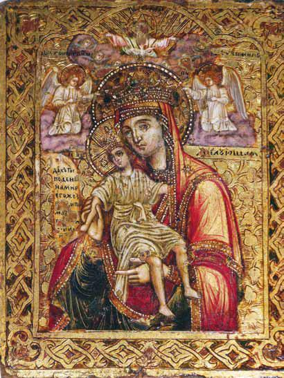 Ikona, Bogorodica Milujaštaja, galerija na ikoni Prilep, kraj na XVIII početok na XIX vek.